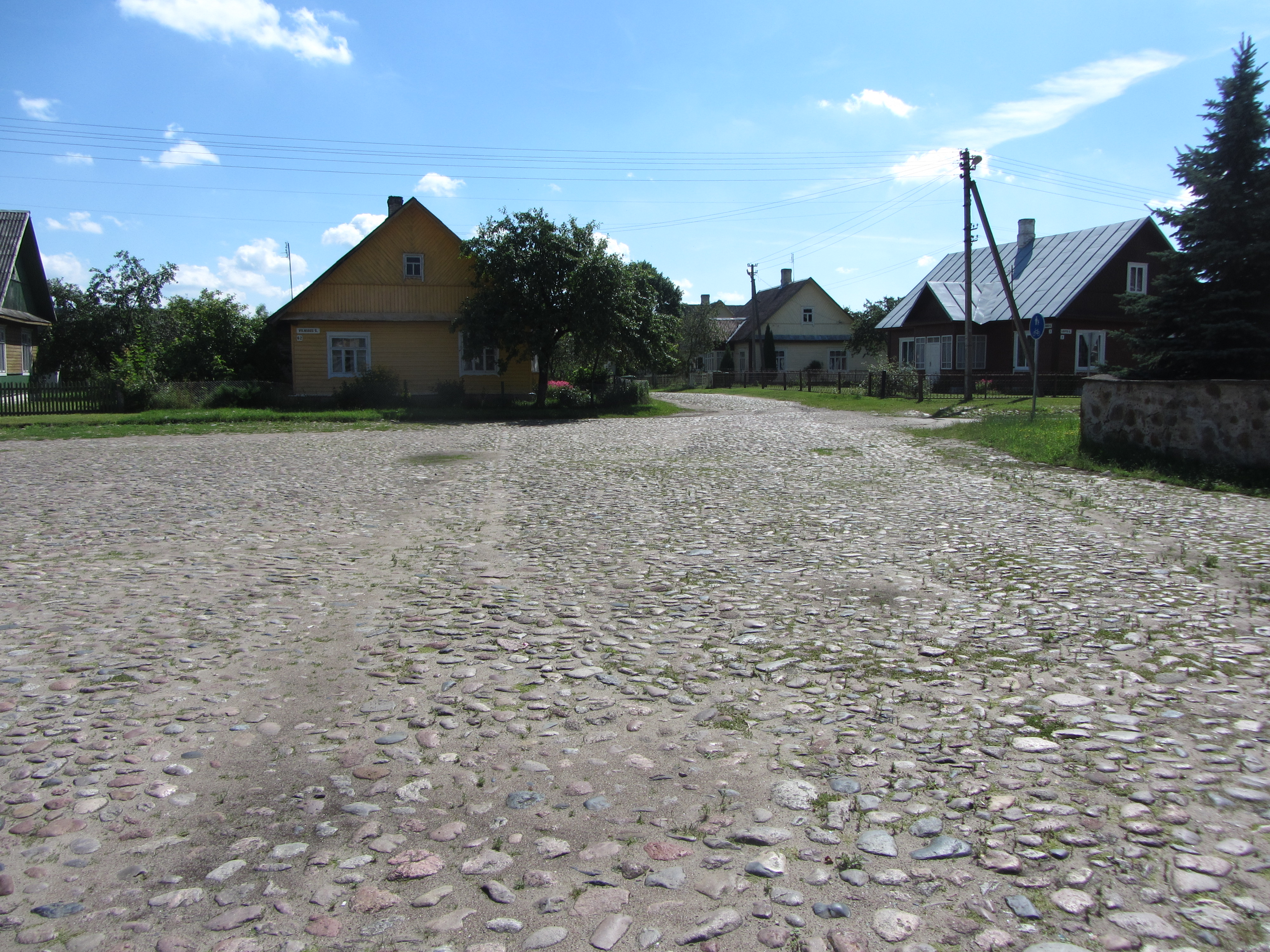 Užuperkasis, Lithuania